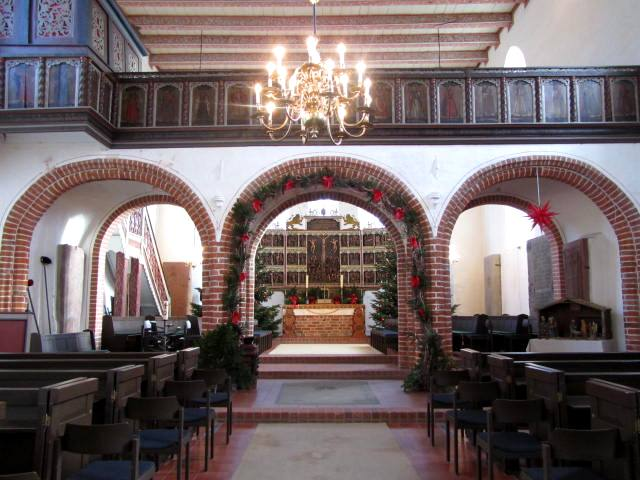 Lettner der St.-Stephanus-Kirche in Schortens, Niedersachsen, Deutschland